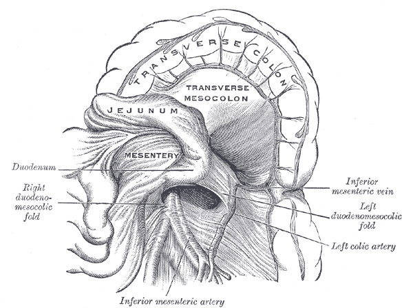 Duodenojejunal fossa. (Poirier and Charpy.)